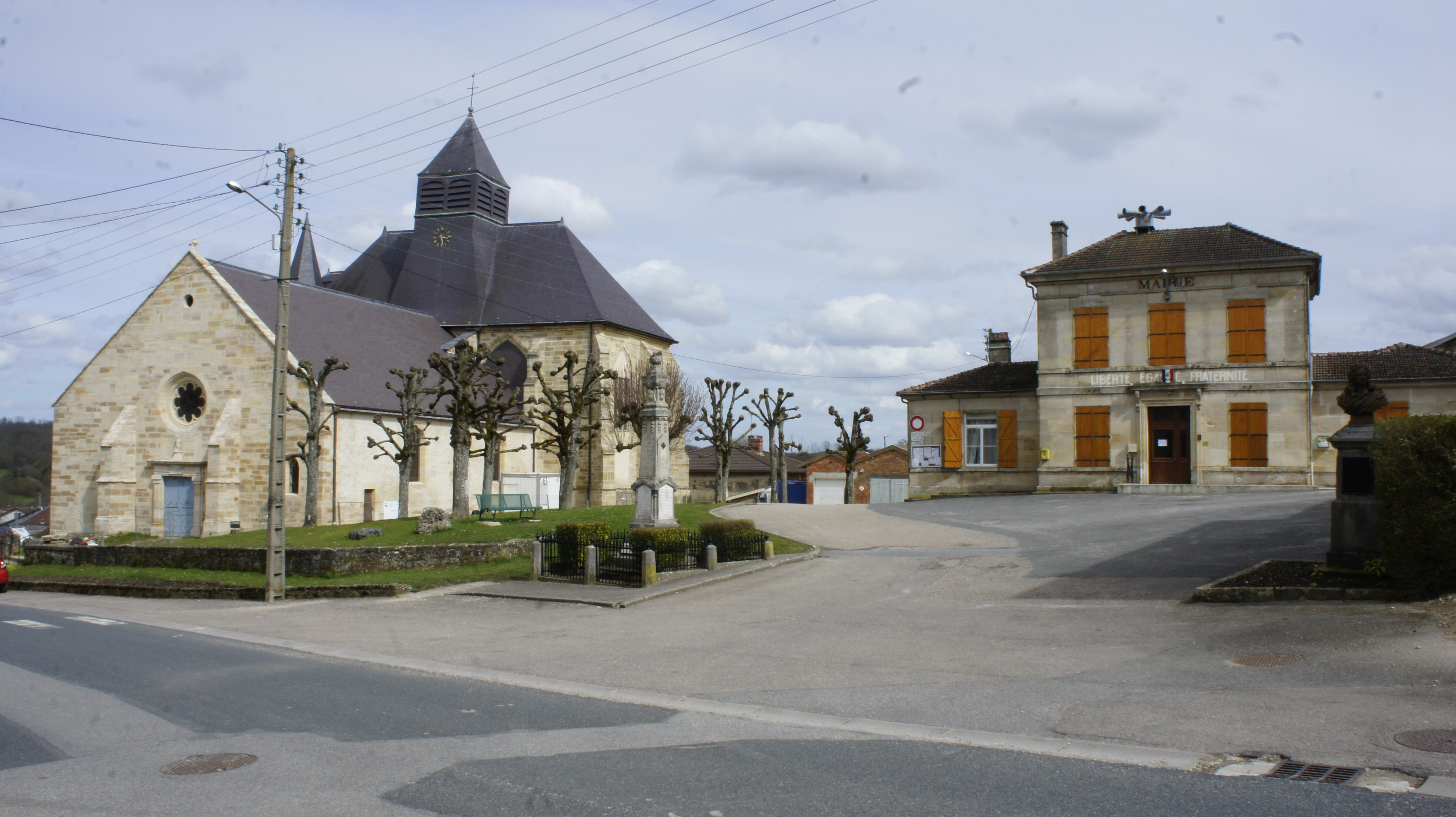 Place de la mairie où se trouve aussi le monument aux morts .